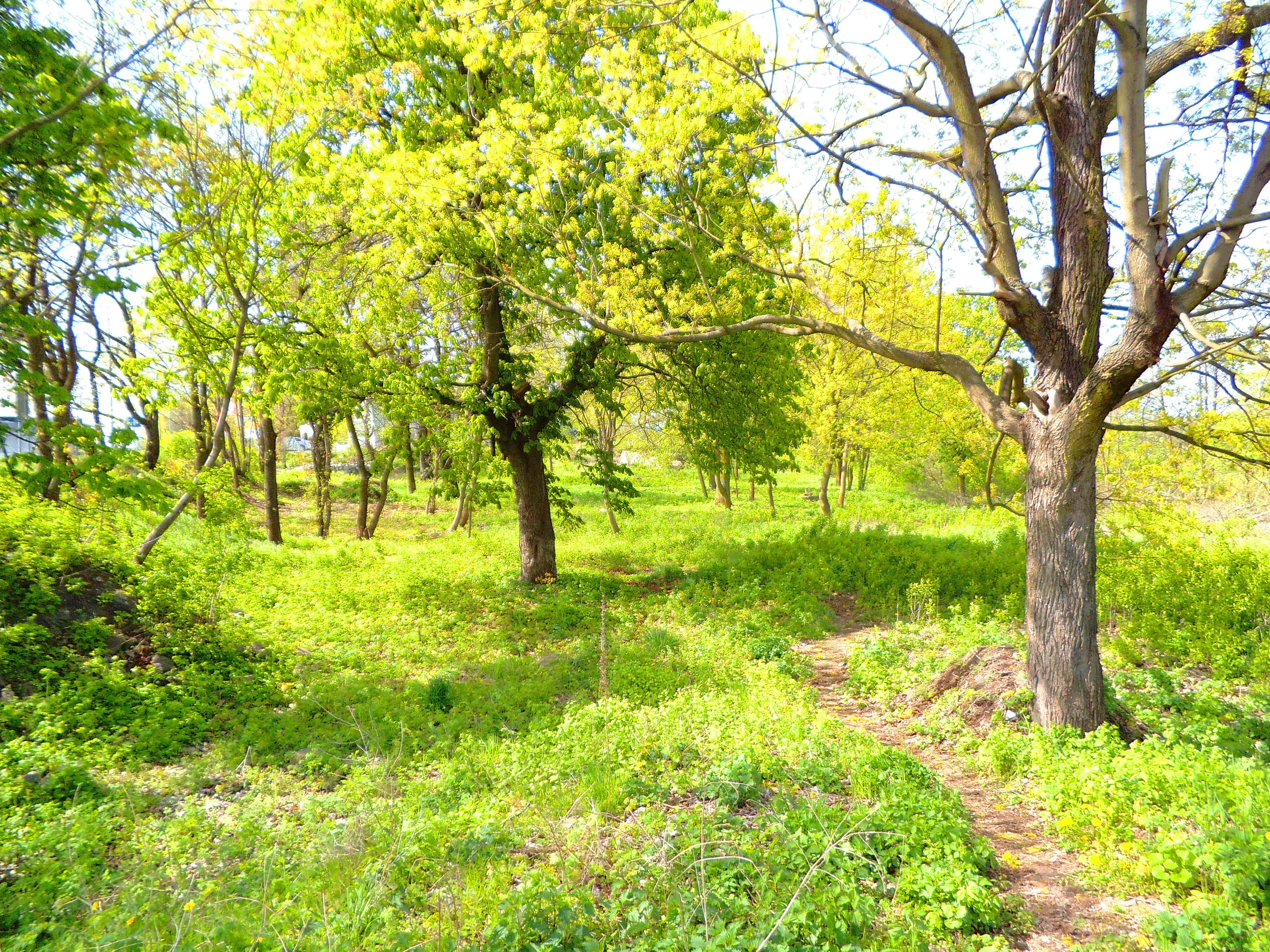 Cmentarz ewangelicki w Toruniu (ul. Poznańska 114)